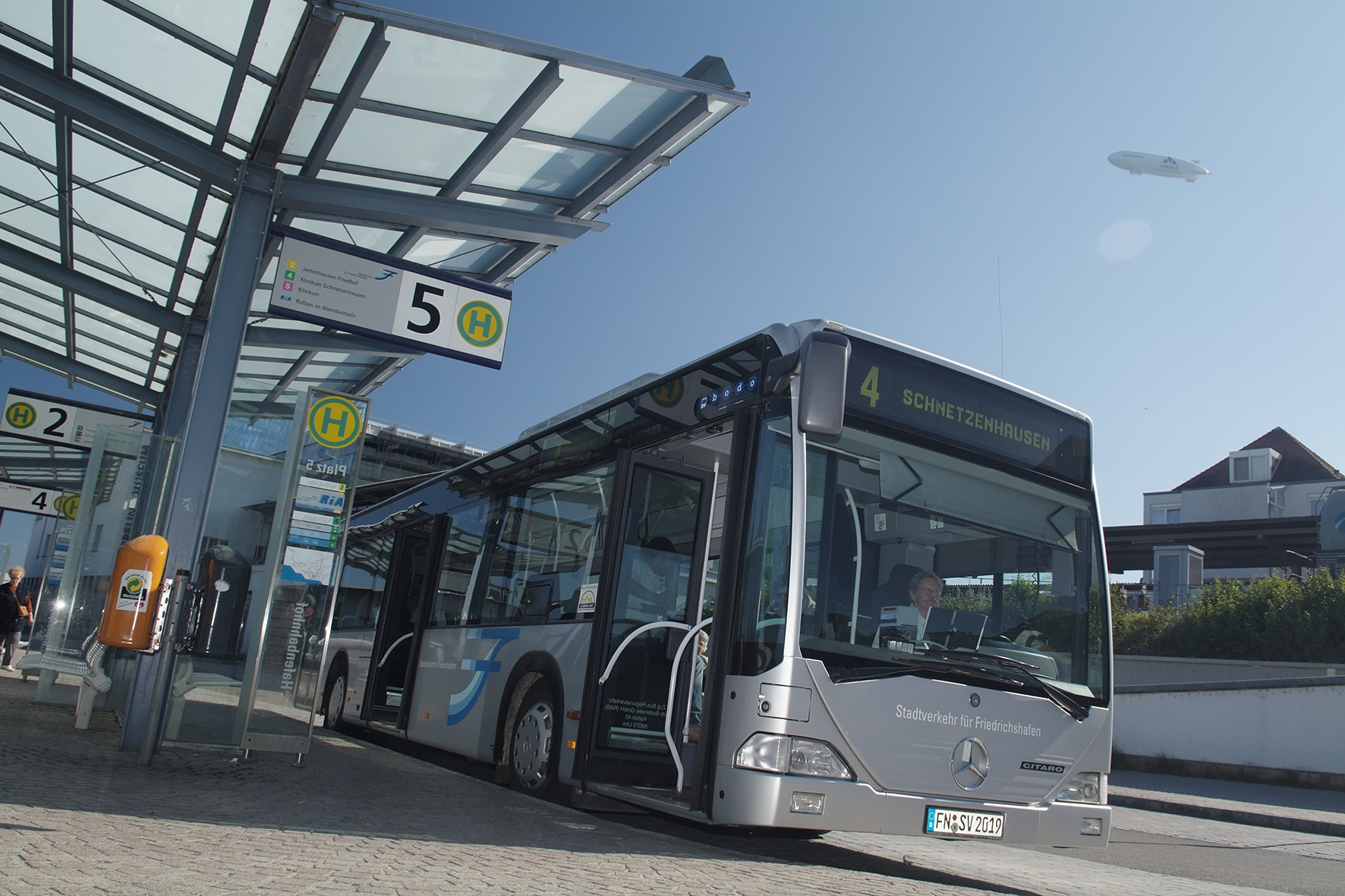 Verkehrsbetrieb Stadtverkehr Bodenseekreis